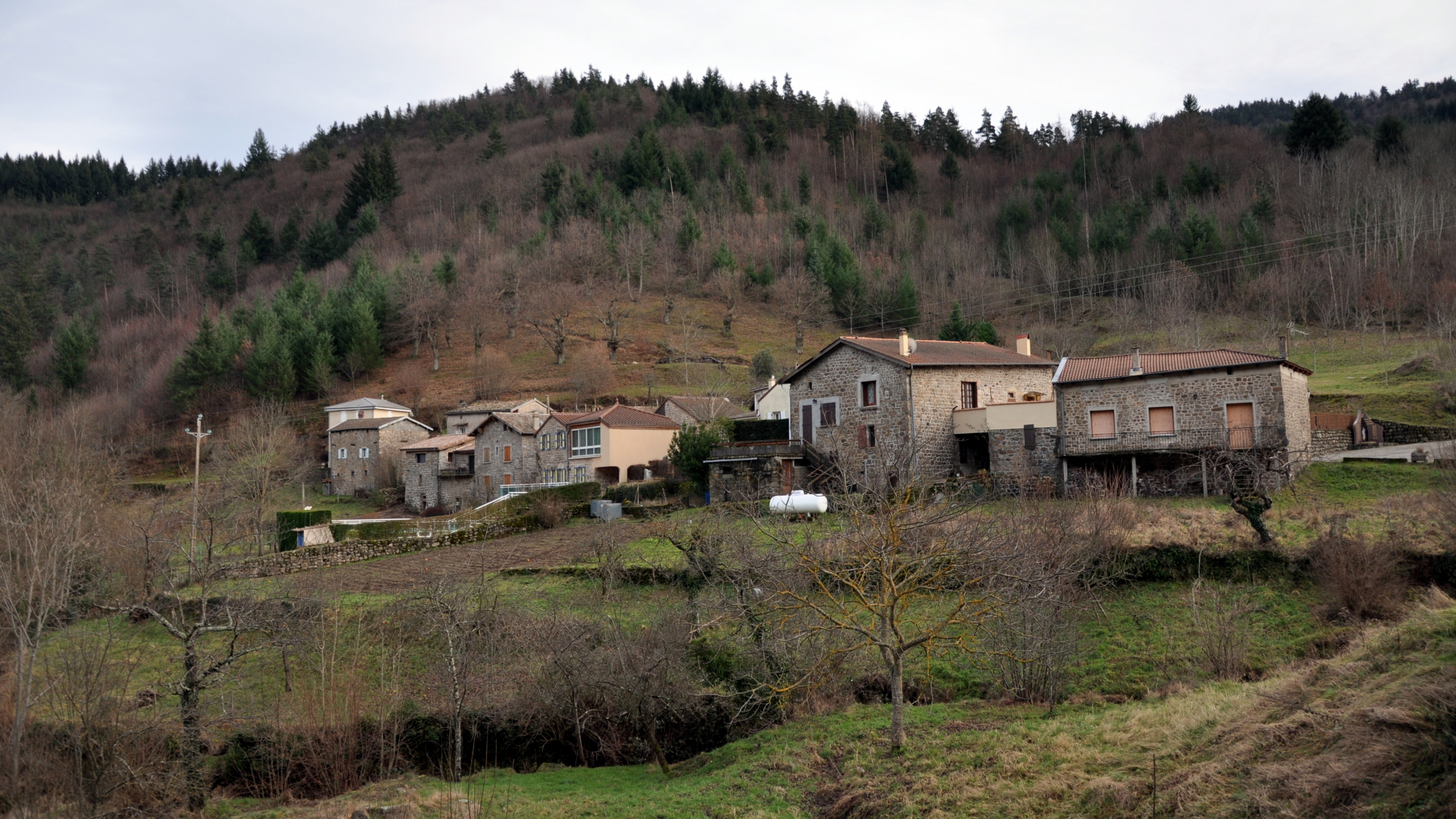 Saint-Christol depuis la D277